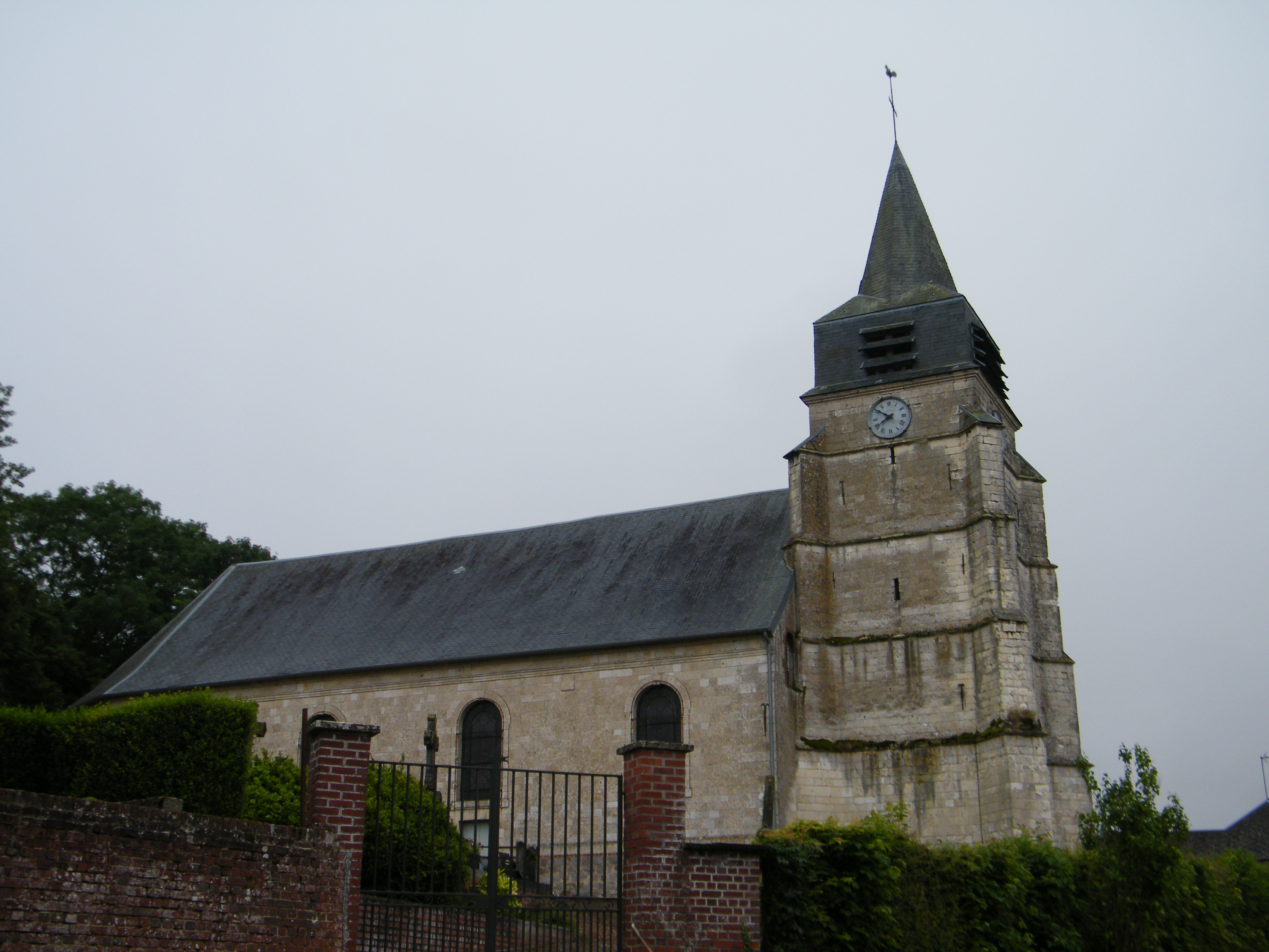 Église Notre-Dame de Louvencourt, Somme, France.